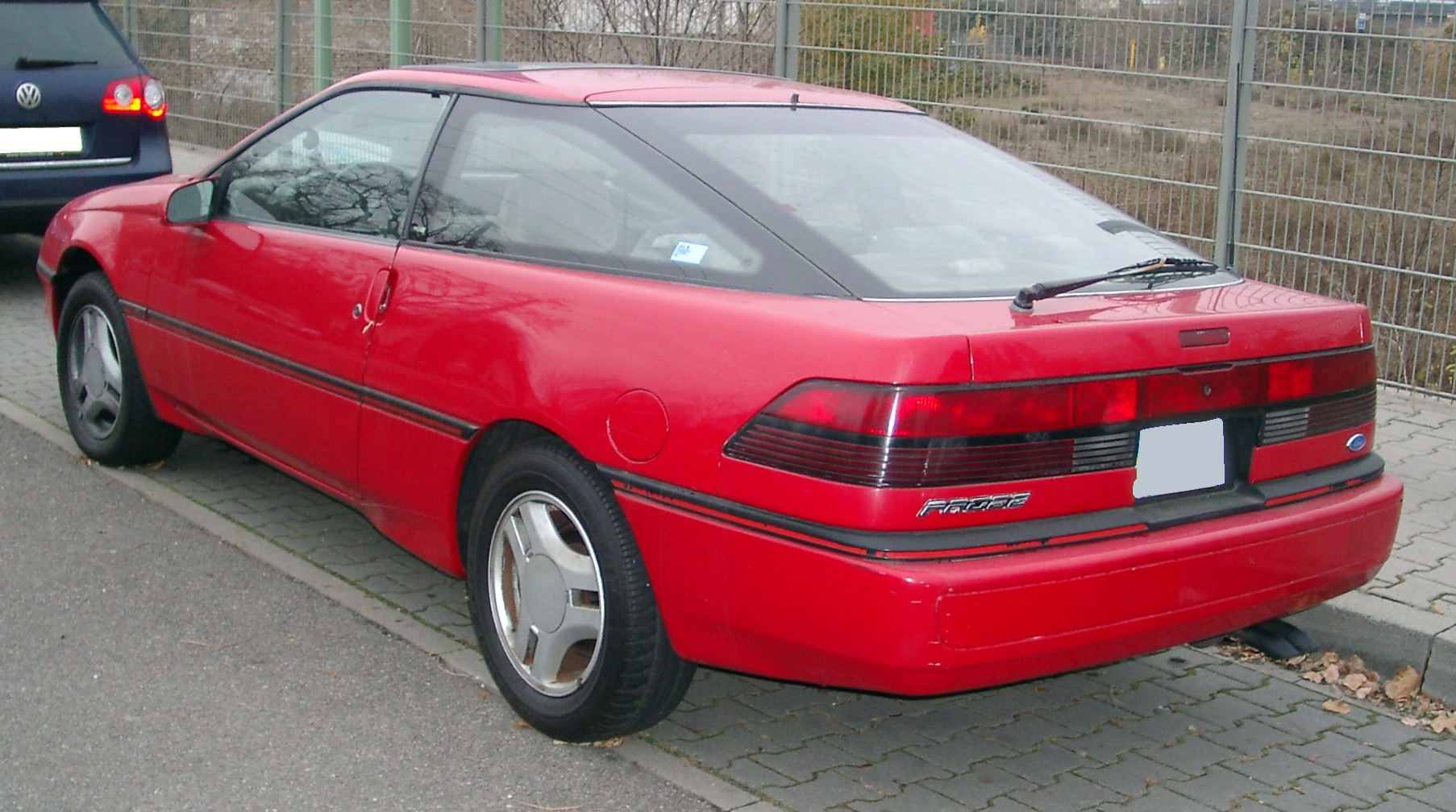 Ford Probe, 1. Generation